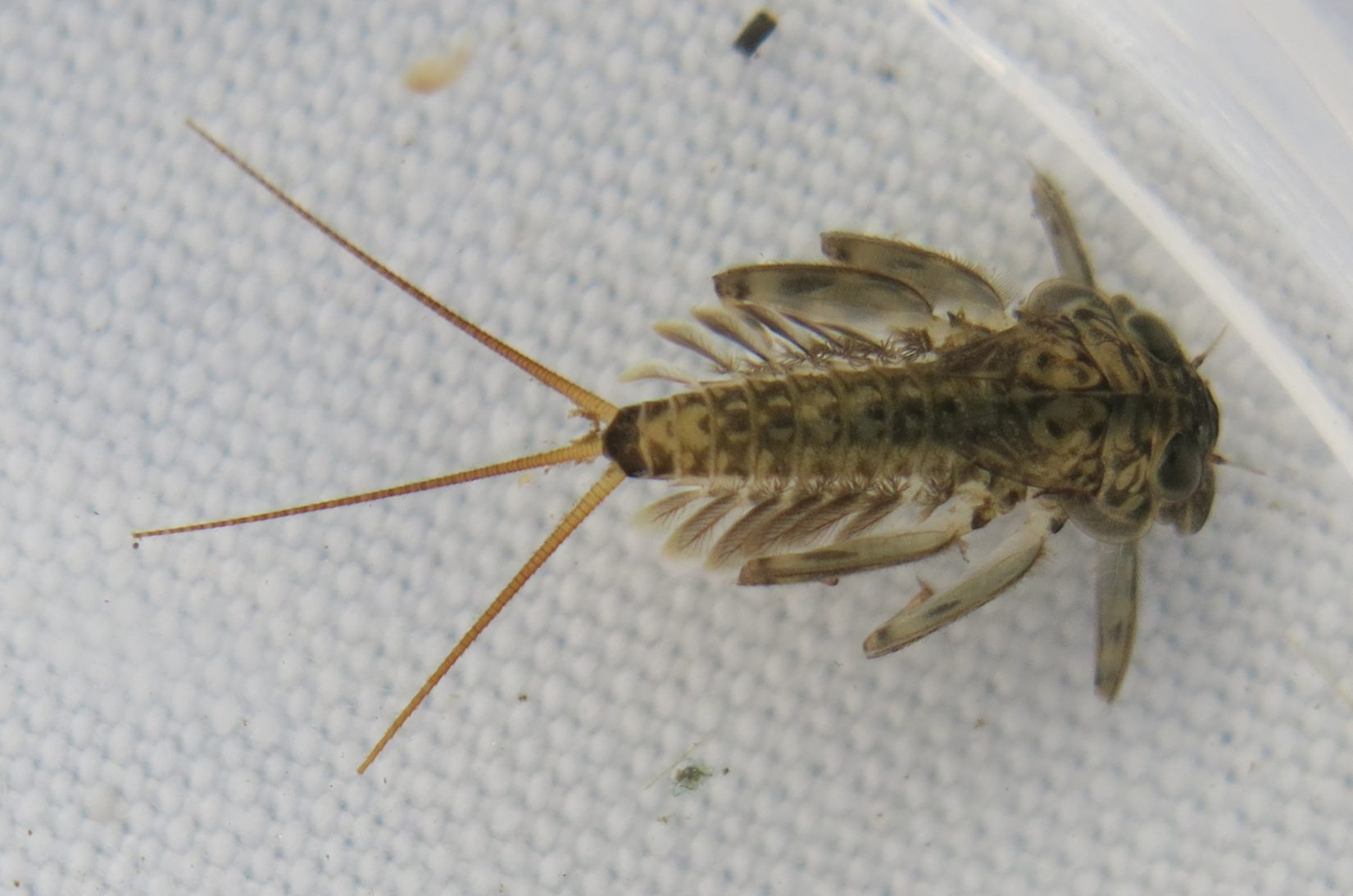 Eintagsfliegenarve